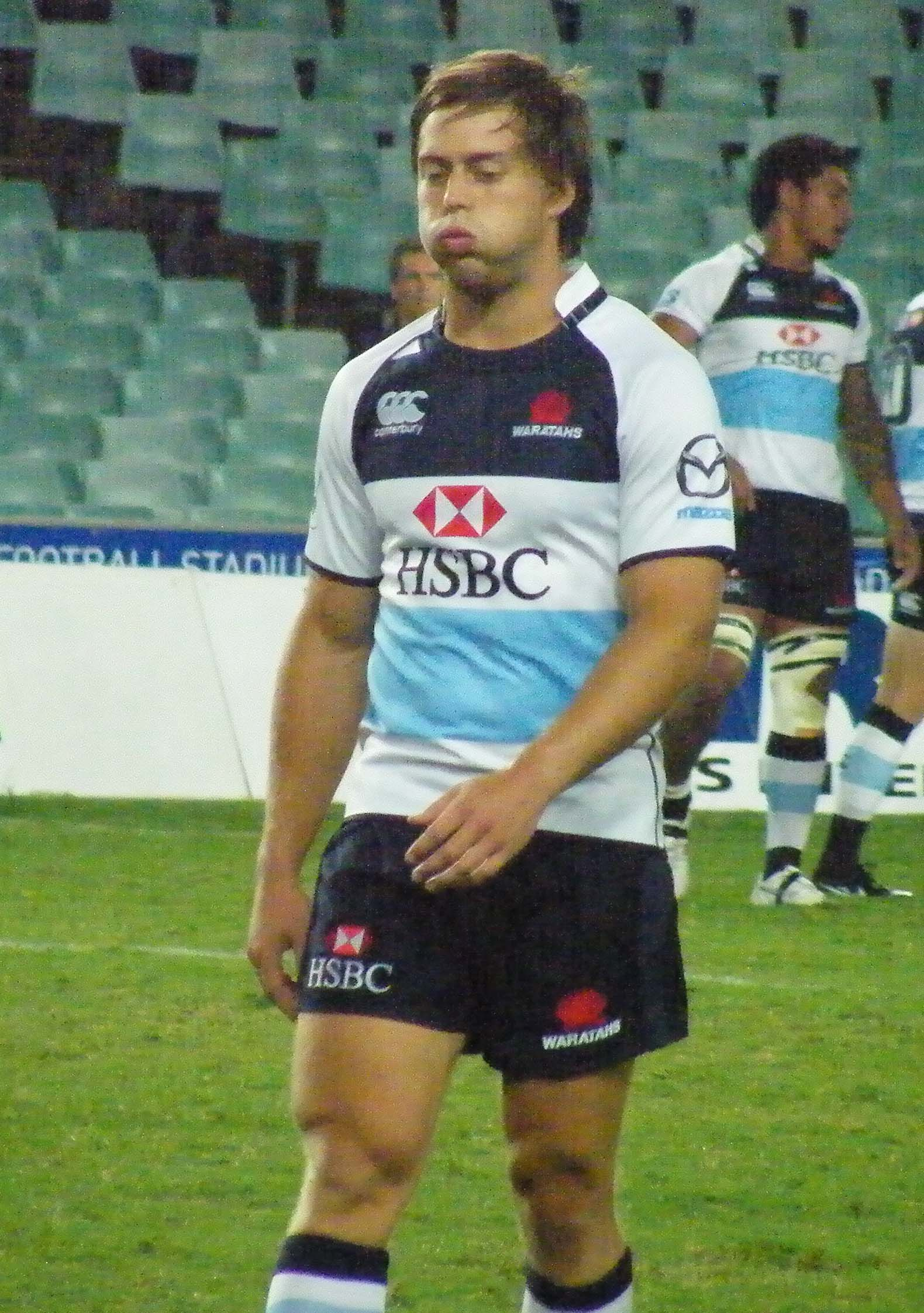 Tom kingston